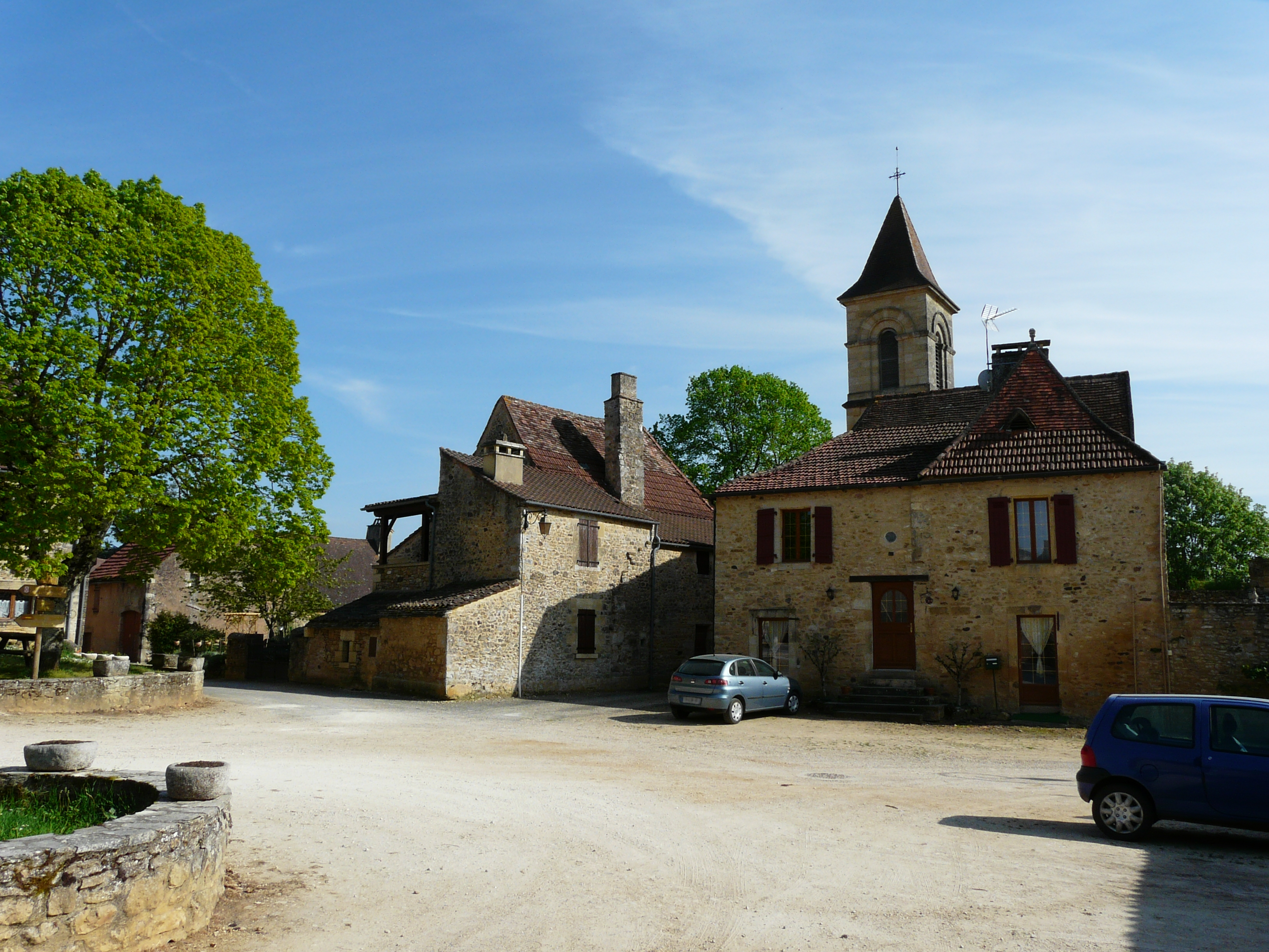 La place du village de Saint-Germain-de-Belvès, Dordogne, France.